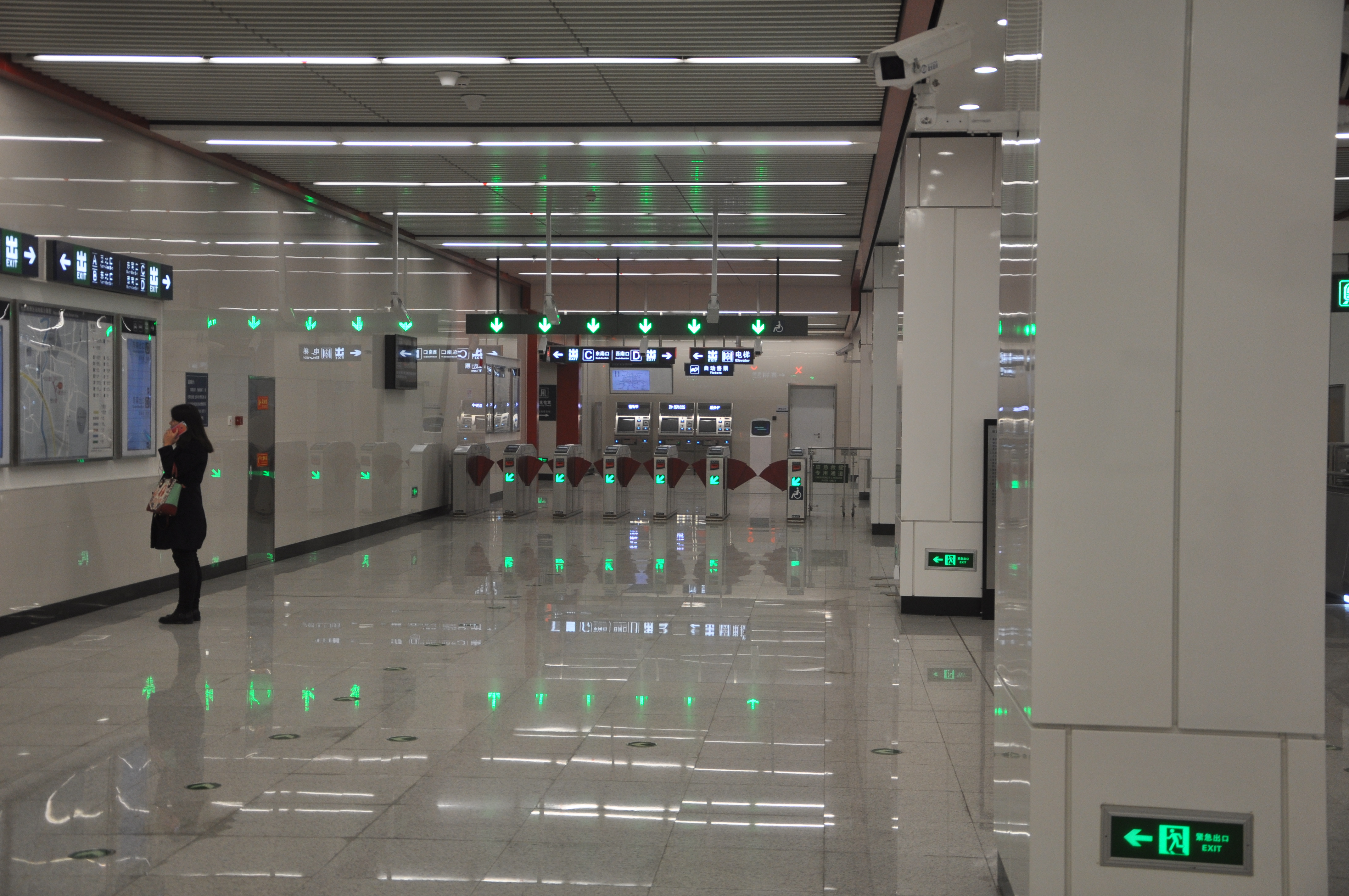 北京地铁昌平线十三陵景区站站厅。